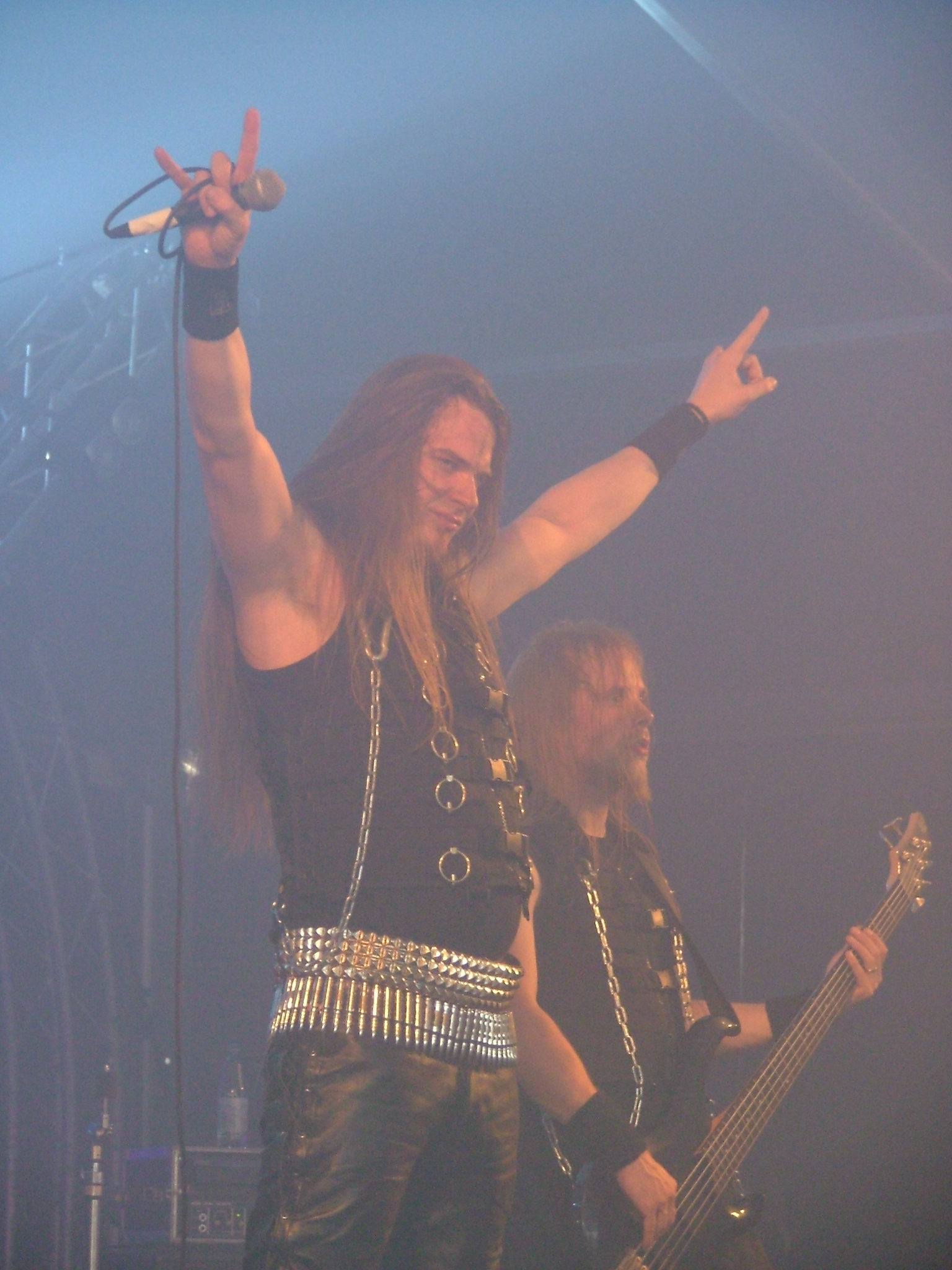 Die finnische Dark-Metal-Band Shade Empire beim Tuska Open Air 2008